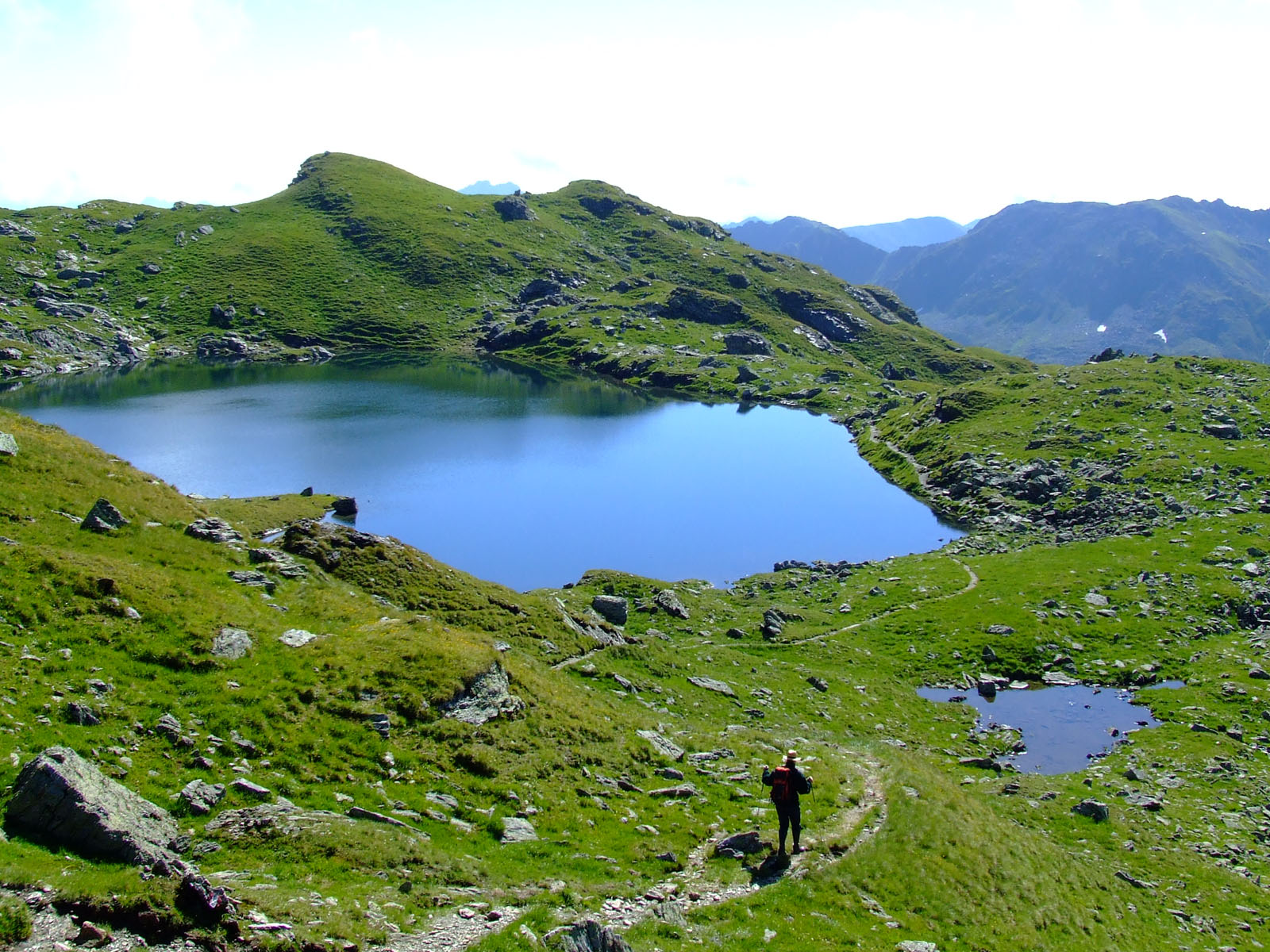 Oberer Wildalmsee (2.324 m) kurz unterhalb des Schafsiedels (2.447 m) in den Kitzbüheler Alpen bei Kelchsau